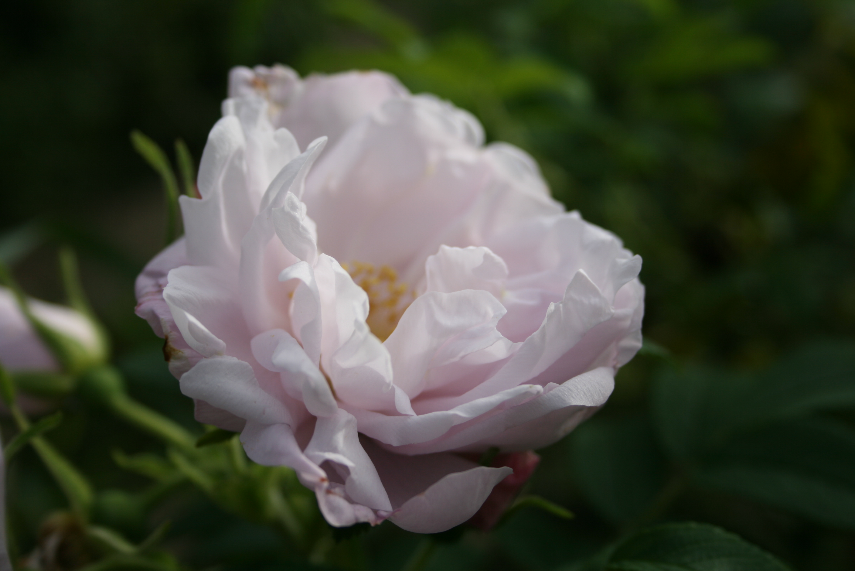 Rosa 'Hansnovem' (SCHNEEKOPPE)